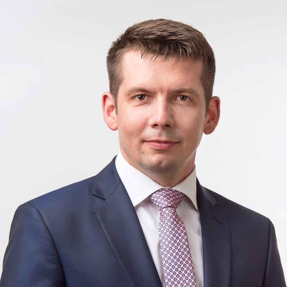 Repinski foto